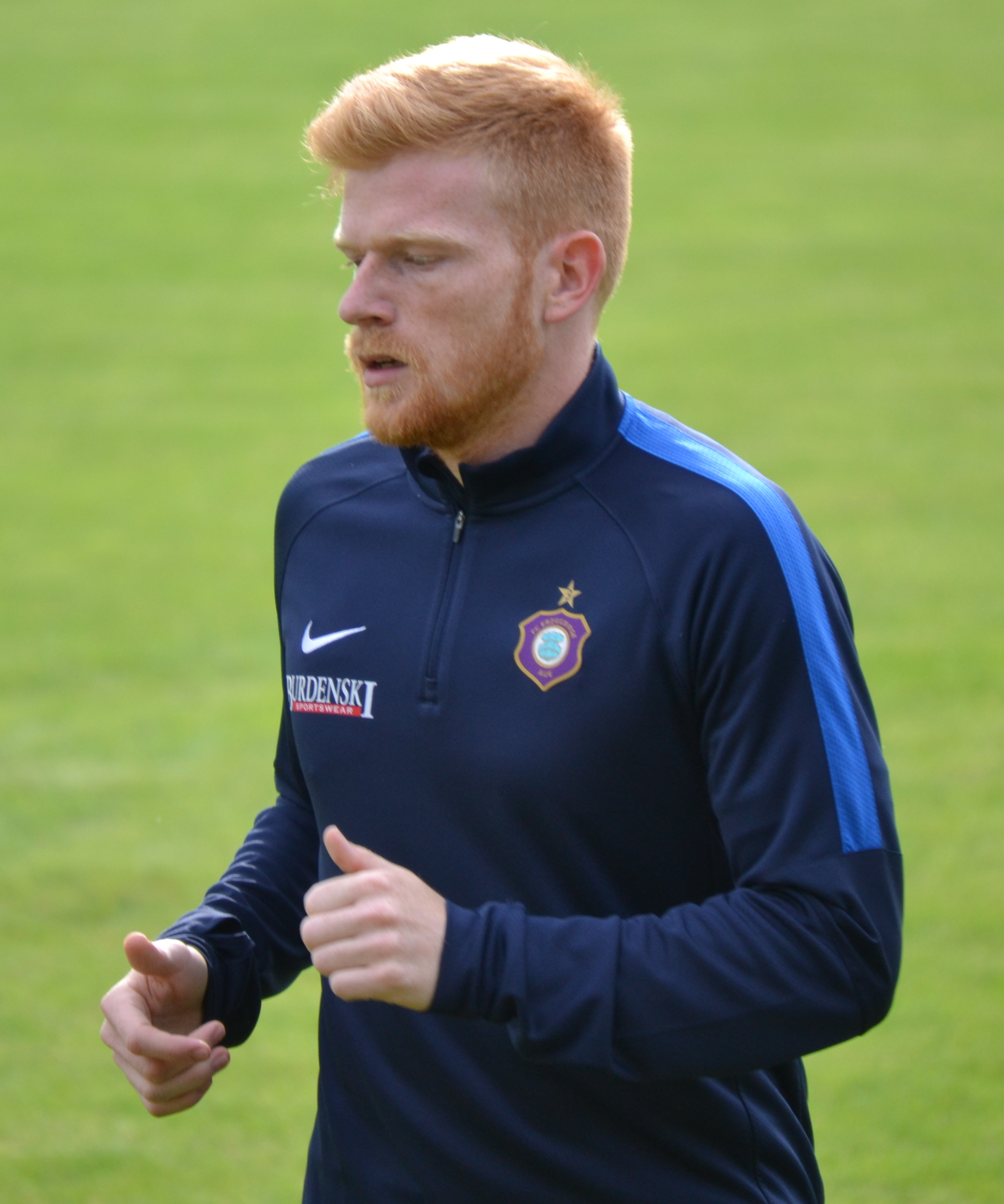 Fabian Kalig beim Aufwärmen vor dem Freundschaftsspiel gegen den HFC Colditz